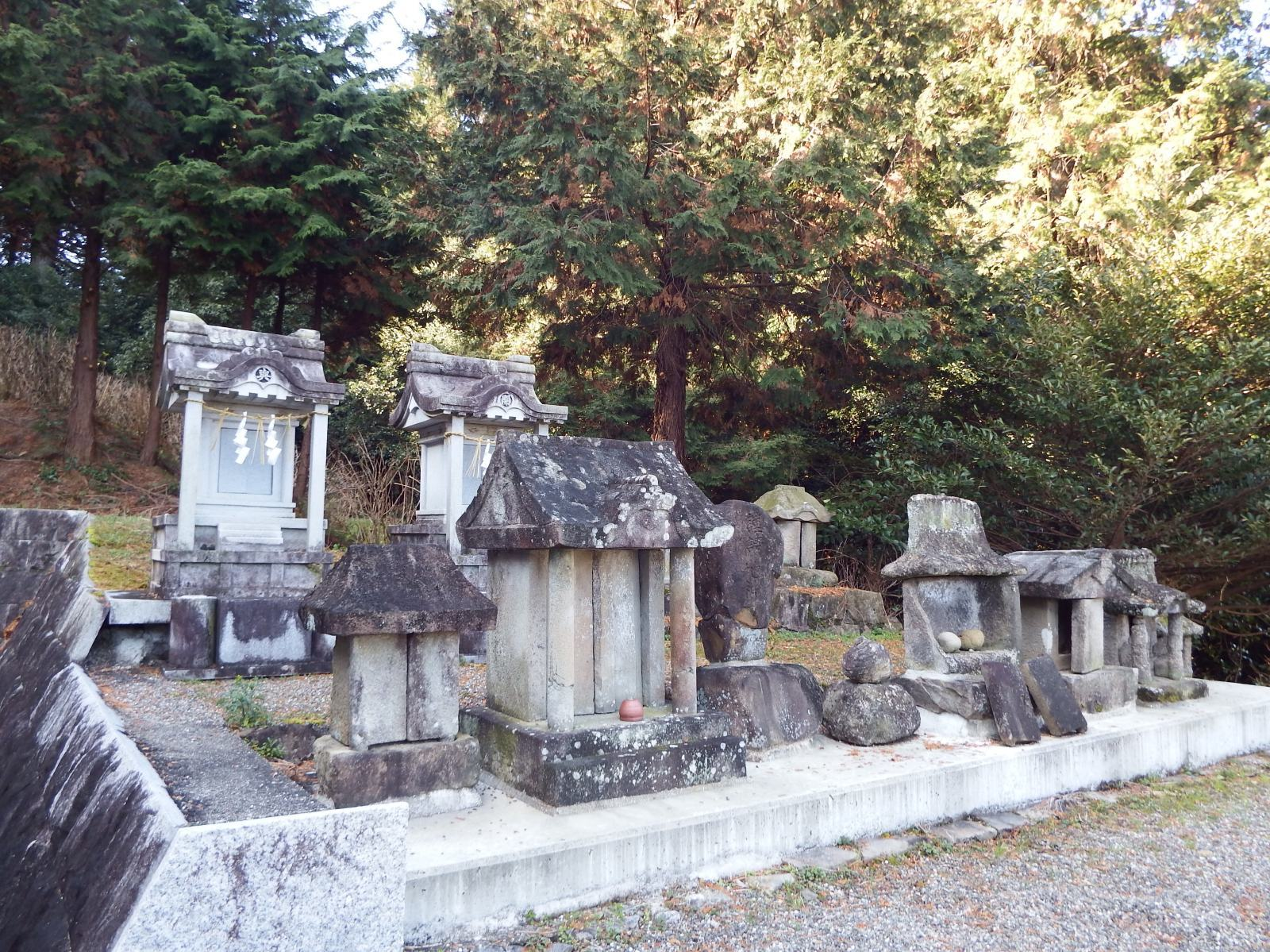 粟井神社の集合摂社